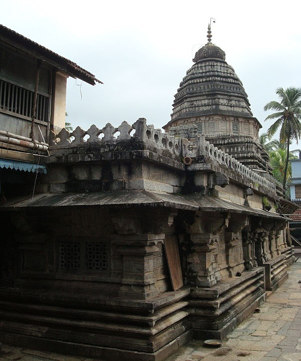 संस्कृतम्: Mahabaleshwarah